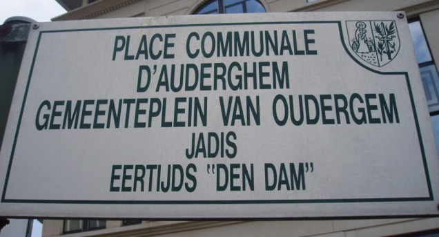 Place Communale Auderghem Den Dam